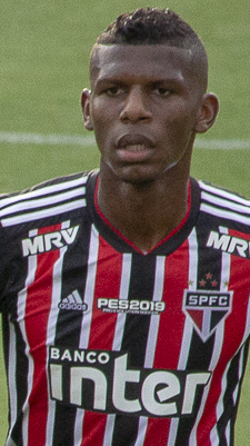 Foto: Douglas Teixeira/Futebol Santista